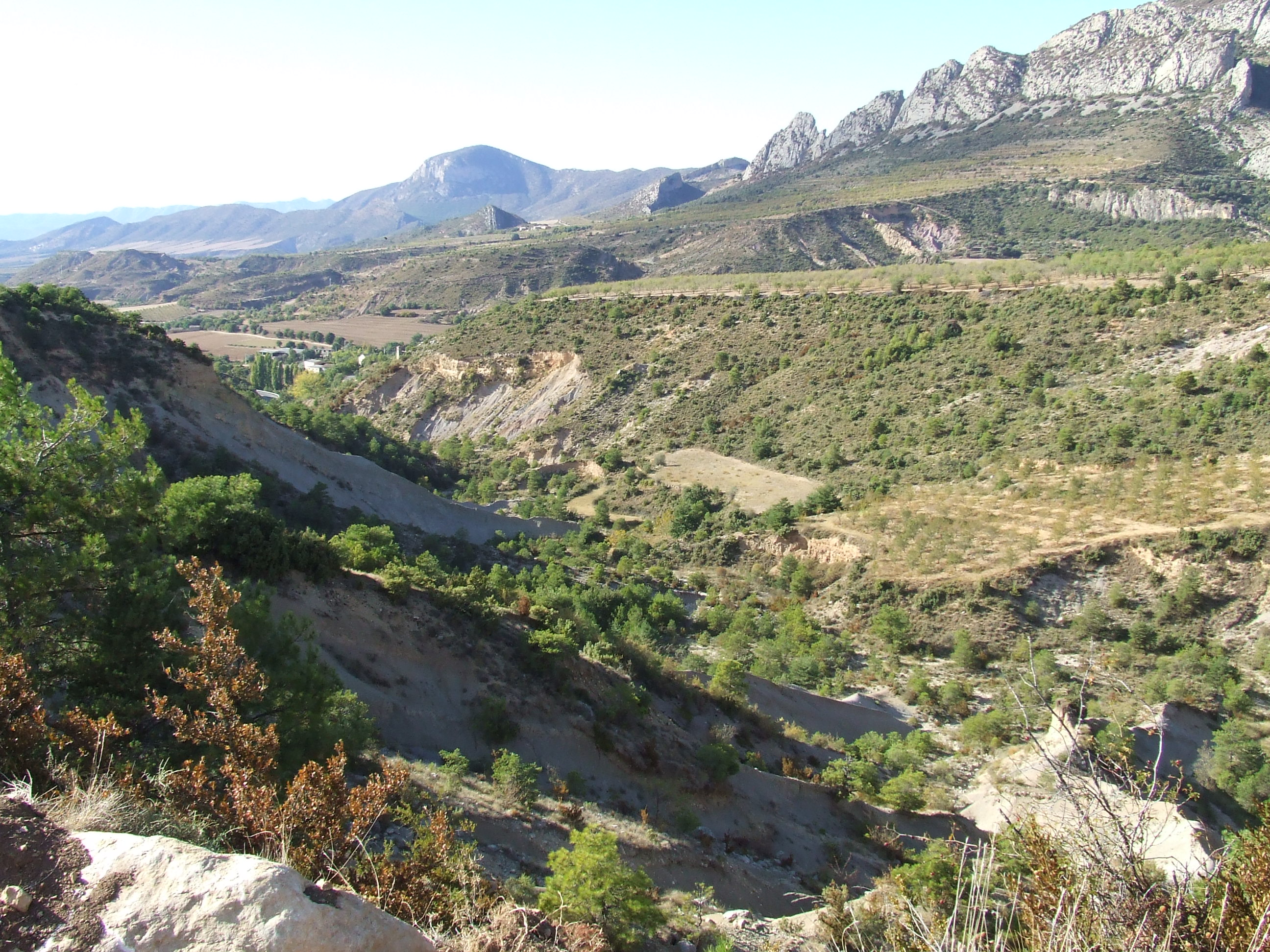 El Barranc de Fonguera (Abella de la Conca, Pallars Jussà)